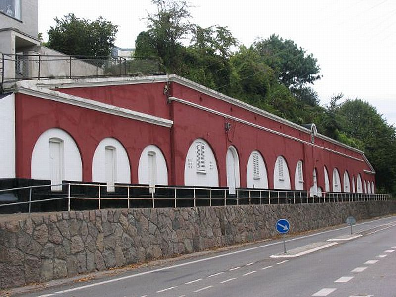 Christiansholms Batteri, struben mod Hvidørevej